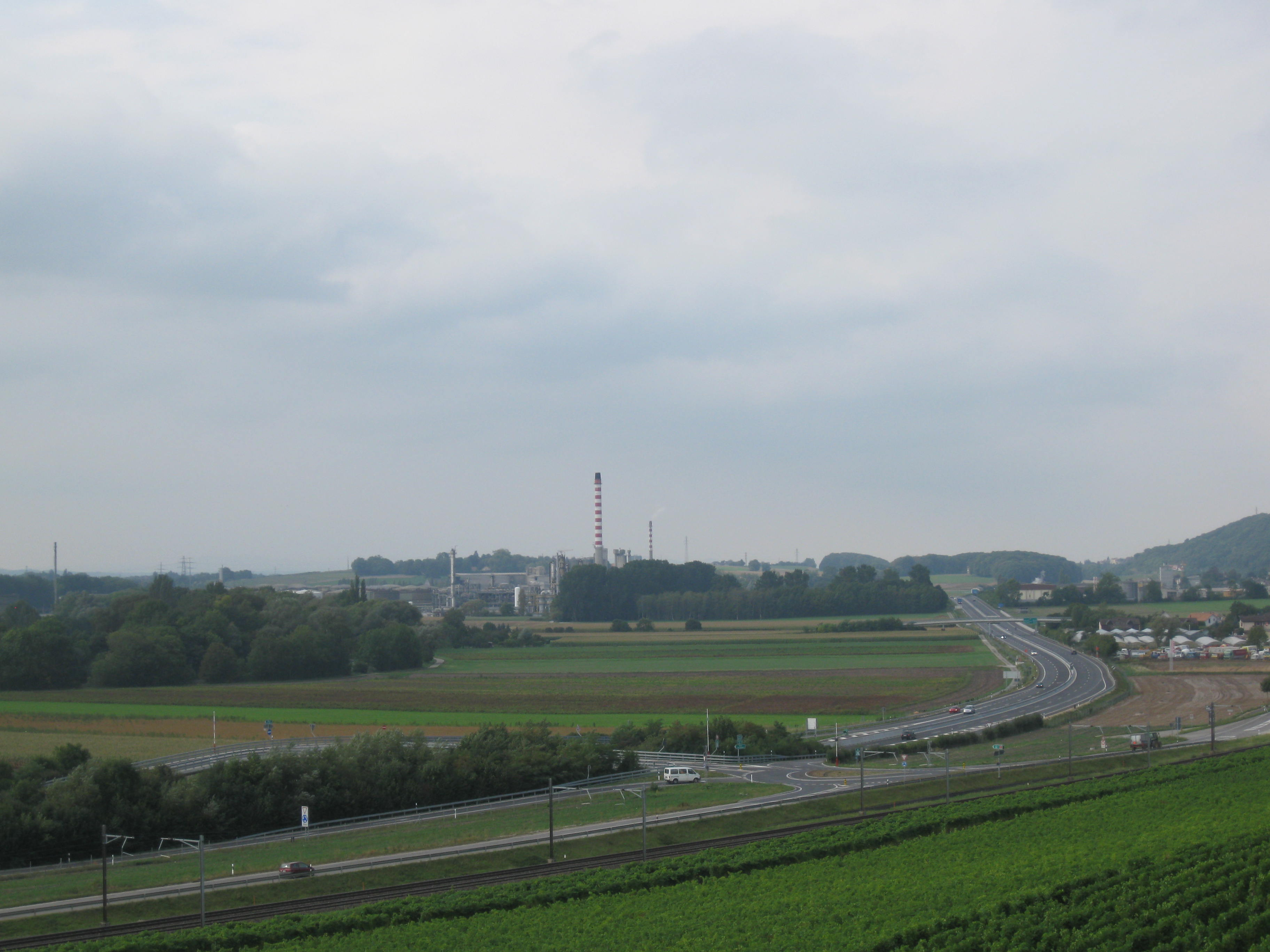 Raffinerie vom Rebberg Landeron aus